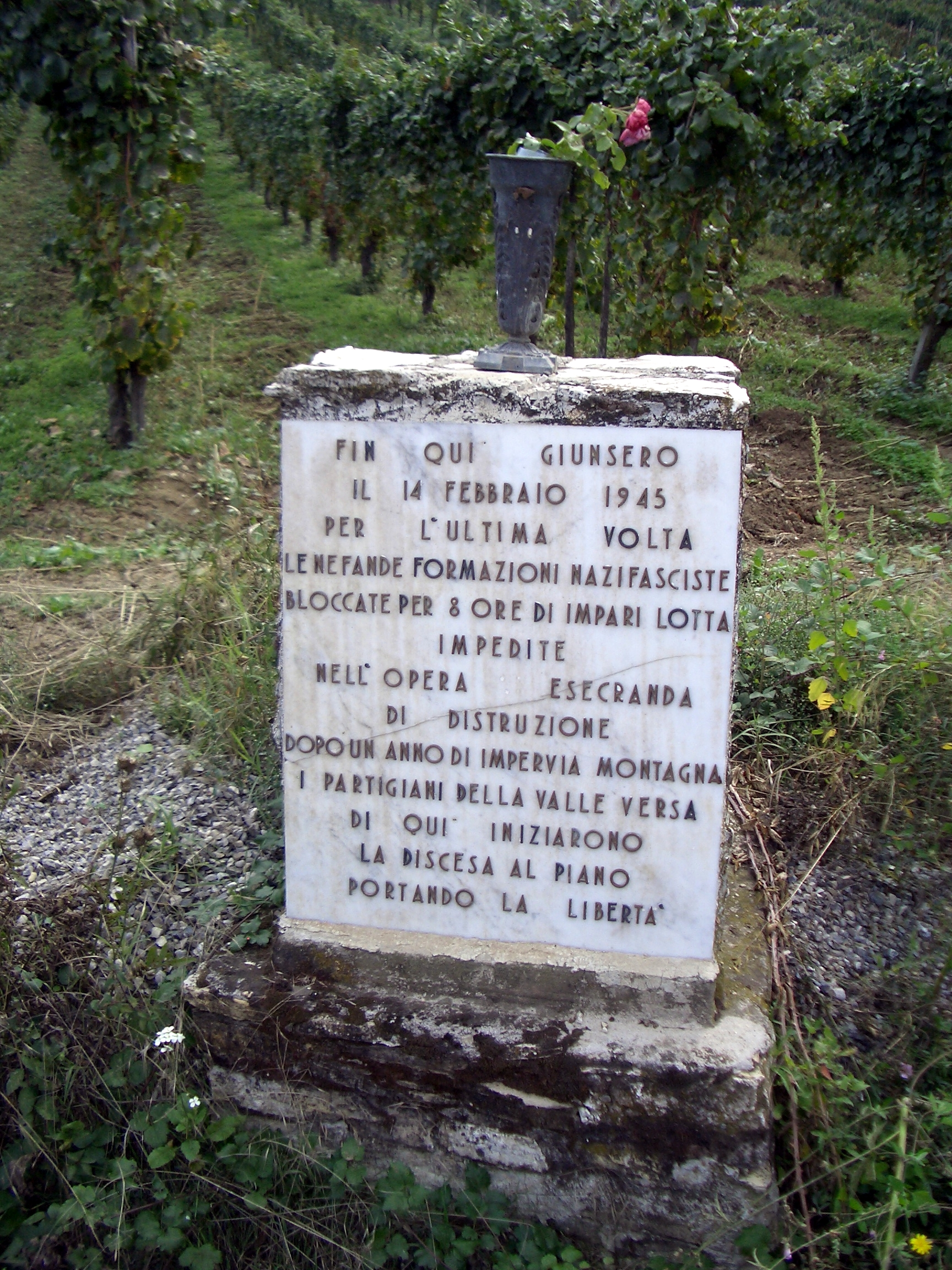 Il cippo sul luogo dove avvenne la "Battaglia delle Ceneri" il 14 febbraio 1945.